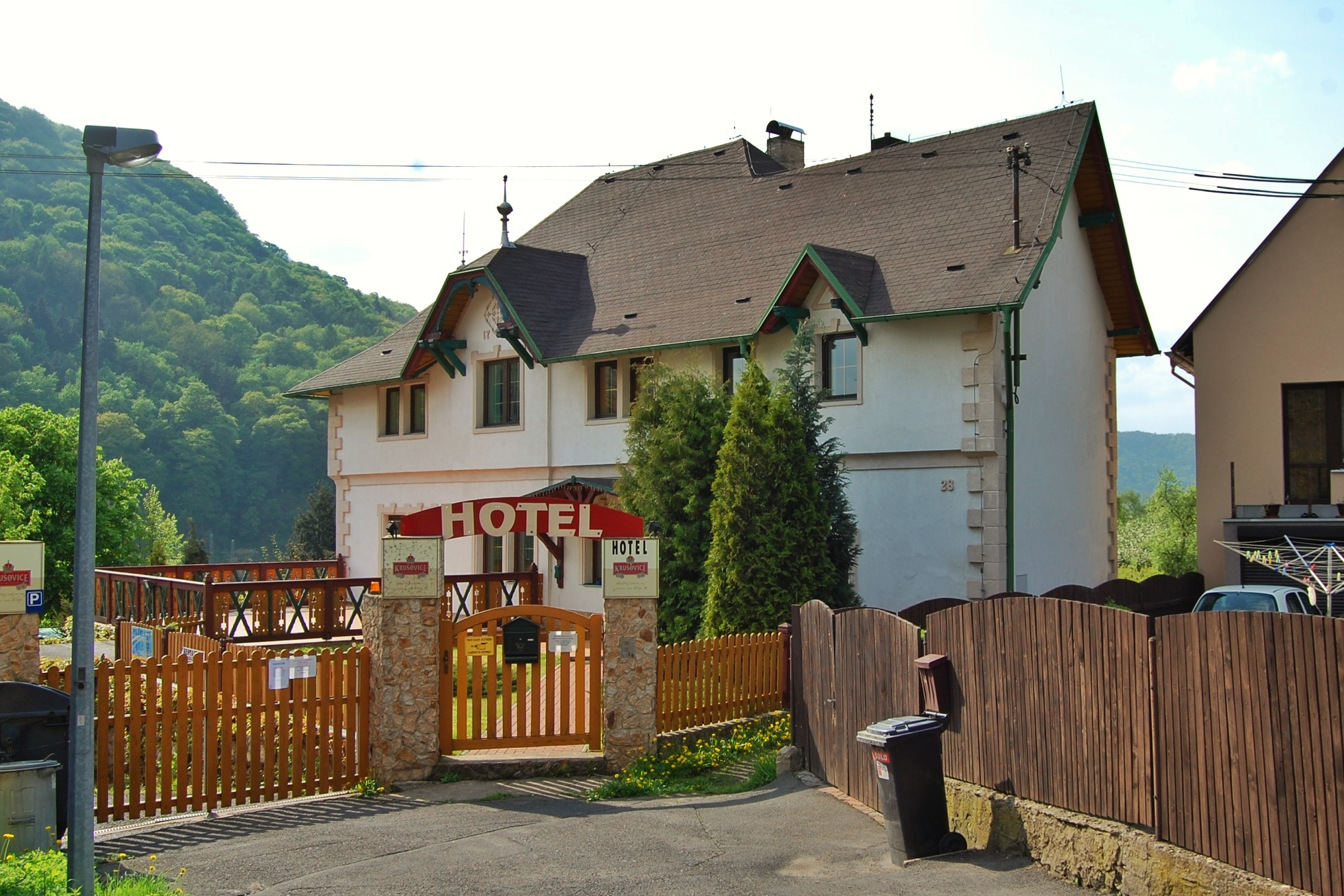 Hotel a restaurant Srdíčko v Brné nad Labem, pohled z ulice K Srdíčku